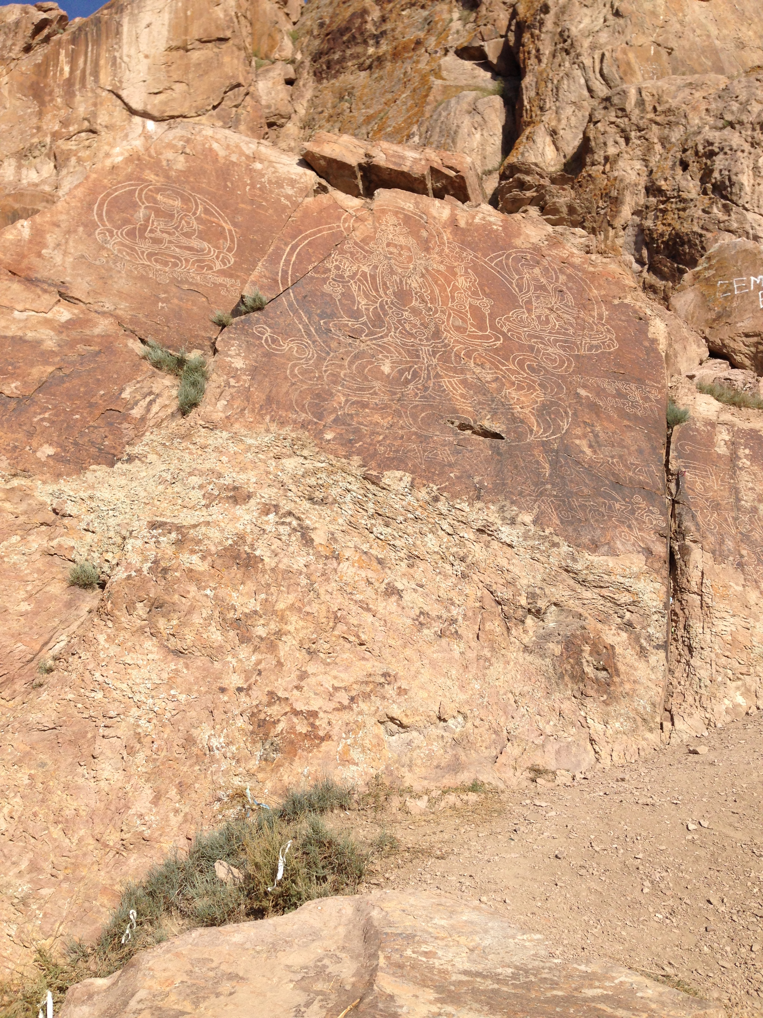 Таңбалы тастағы Будданың тасқа қашалған бейнесі